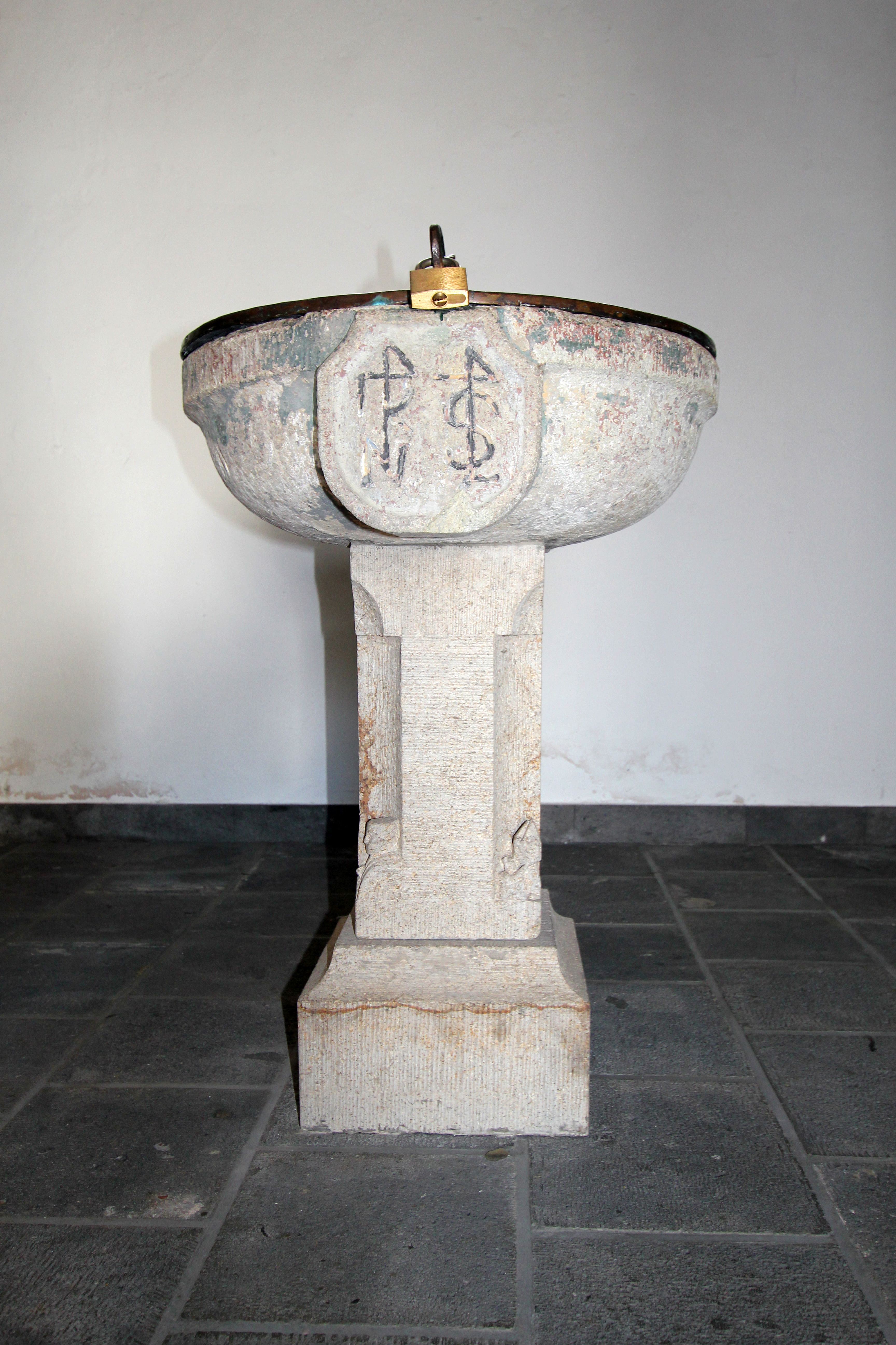 Alt Sankt Maternus Köln-Rodenkirchen. Gothischer Taufstein 1,15 x o,65 m. Einfaches kreisrunders Becken, an dessen Vorderseite ein Schild mit Hausmarken die Buchstaben K. S. zeigt. (Lit. Paul Clemen, Landkreis Köln,S. 175 f.)